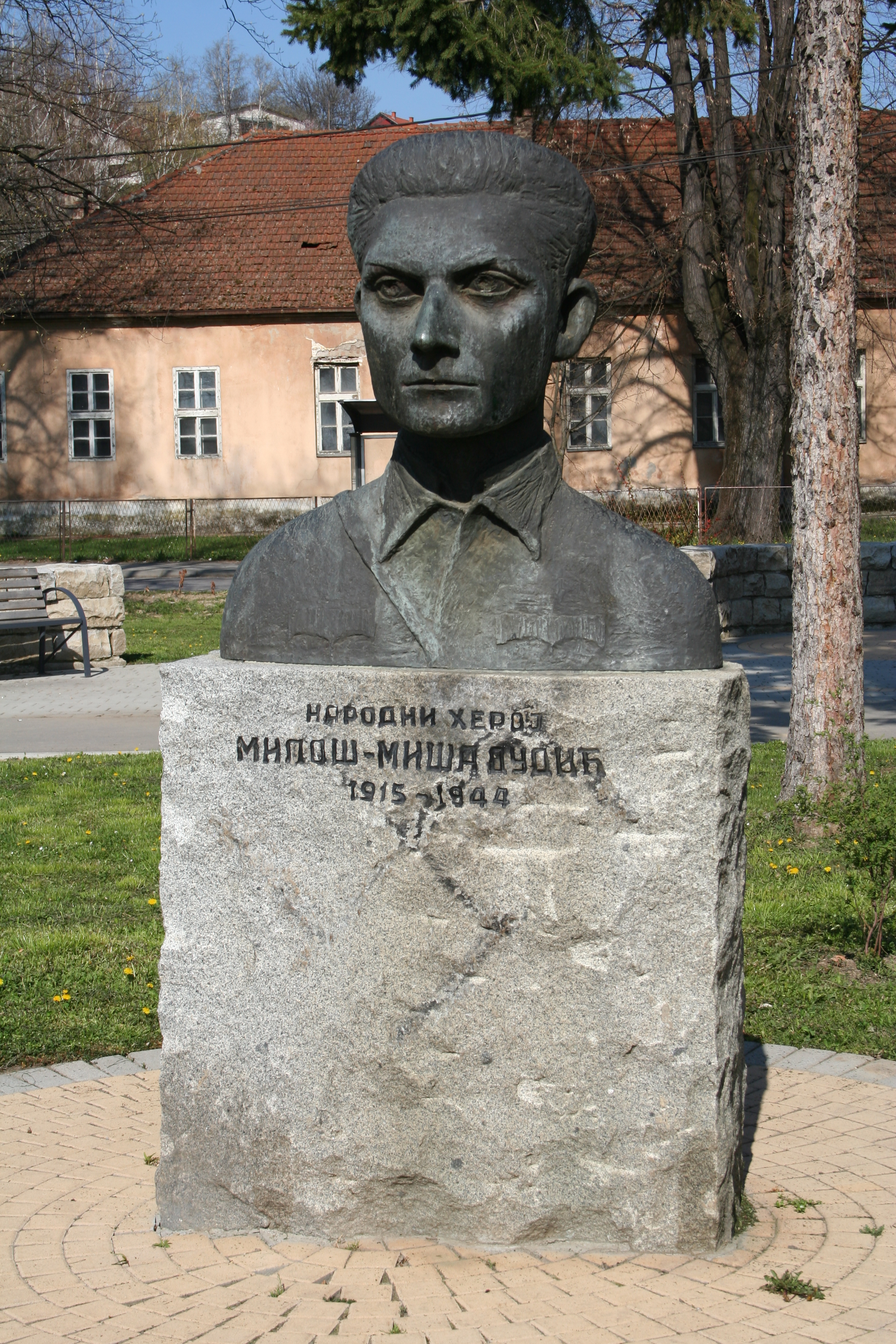 Spomenici, Valjevo